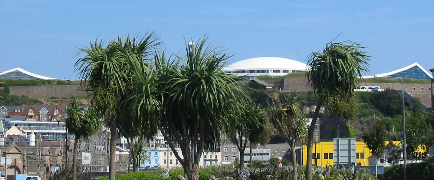 View of Fort Regent from la Route de la Libération, Saint Helier, Jersey